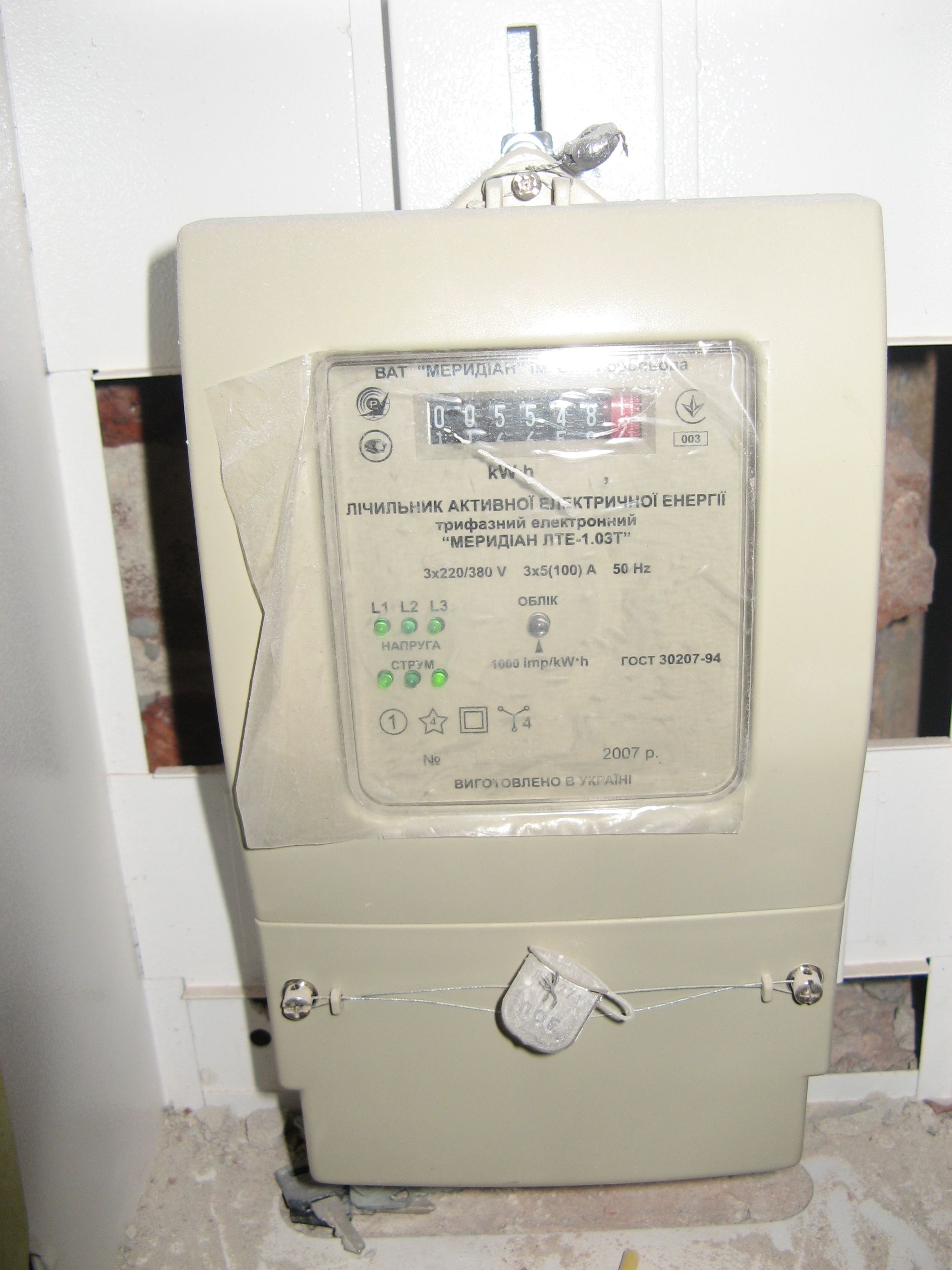 Лічильник Меридіан ЛТЕ1-03, electrical counter